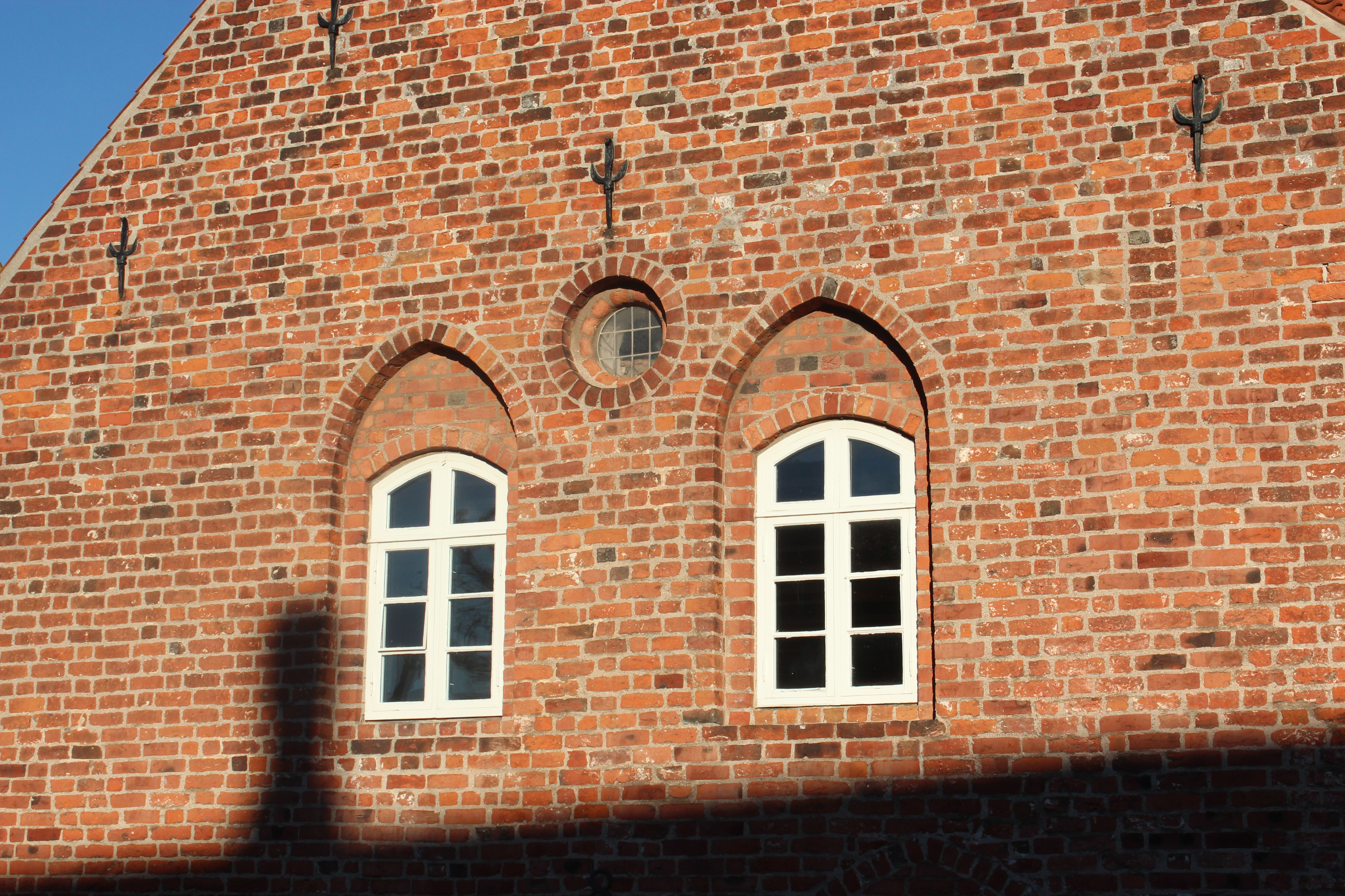 Vinduer ud til Adelgade.